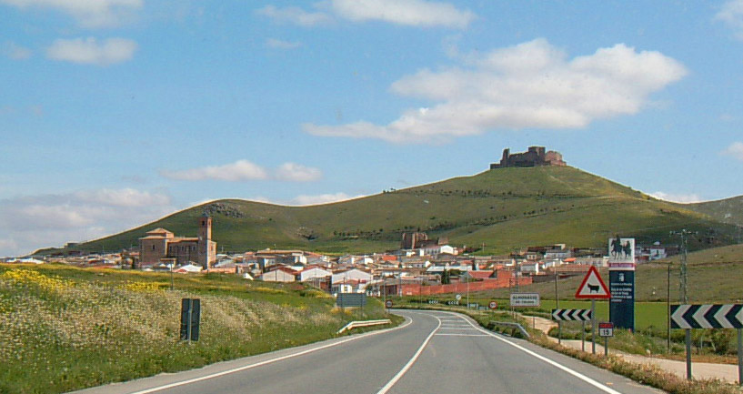 Almonacid de Toledo. Entrada al pueblo dirección Toledo.